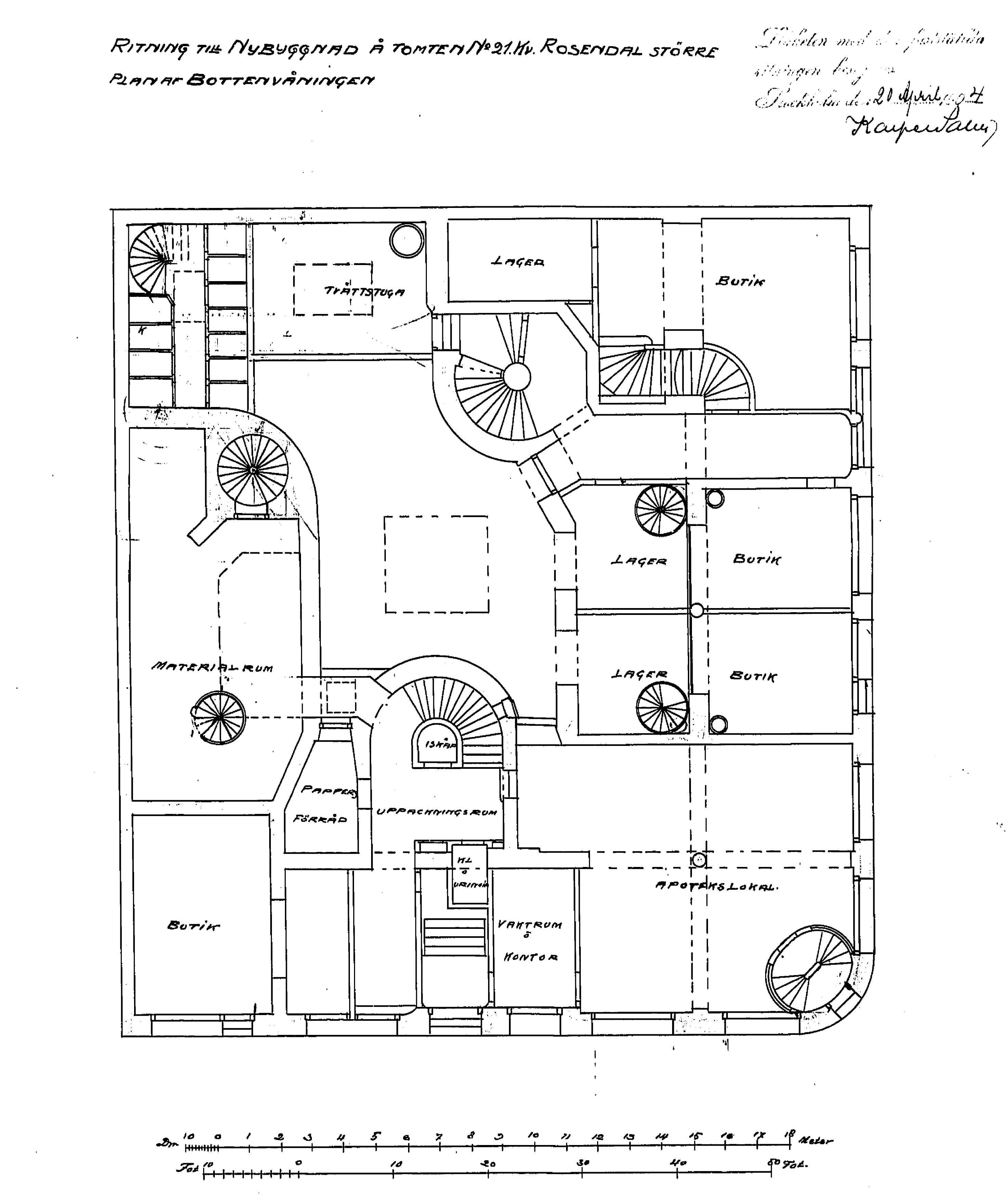 Ritning till nybygget av fastigheten Rosendal större 221, Hornsgatan 29a